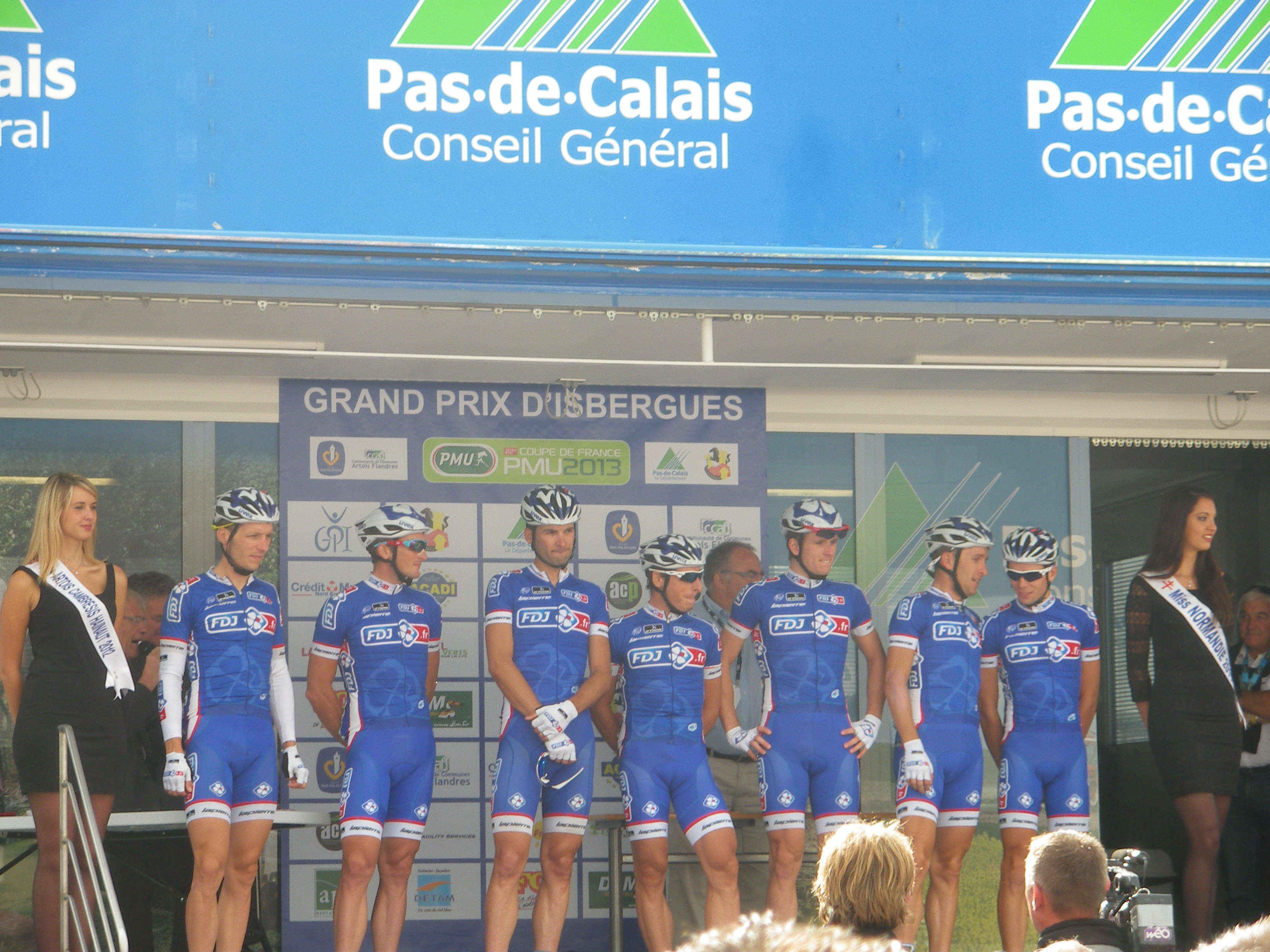 Formation FDJ.fr présente au Grand Prix d'Isbergues 2013.